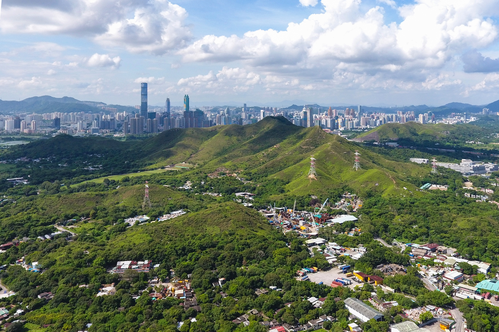 Tai Shek Mo